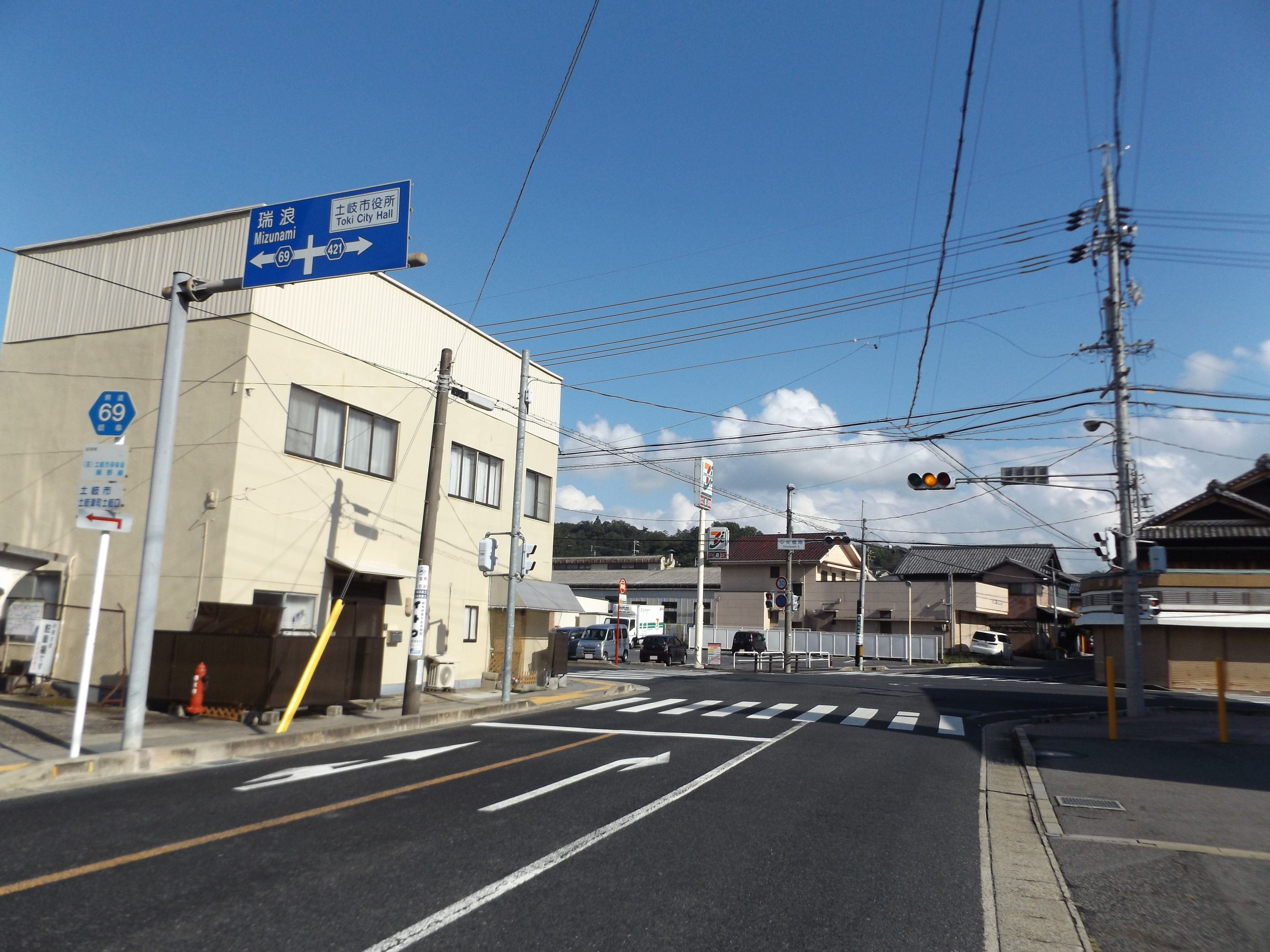 岐阜県土岐市土岐津町土岐口にある中央橋南交差点。 その名の通り、土岐川に架かる中央橋の南にある。 岐阜県道69号土岐市停車場細野線と岐阜県道421号武並土岐多治見線の交点で、手前側が69号、右折すると421号、左折すると両者の重複区間。